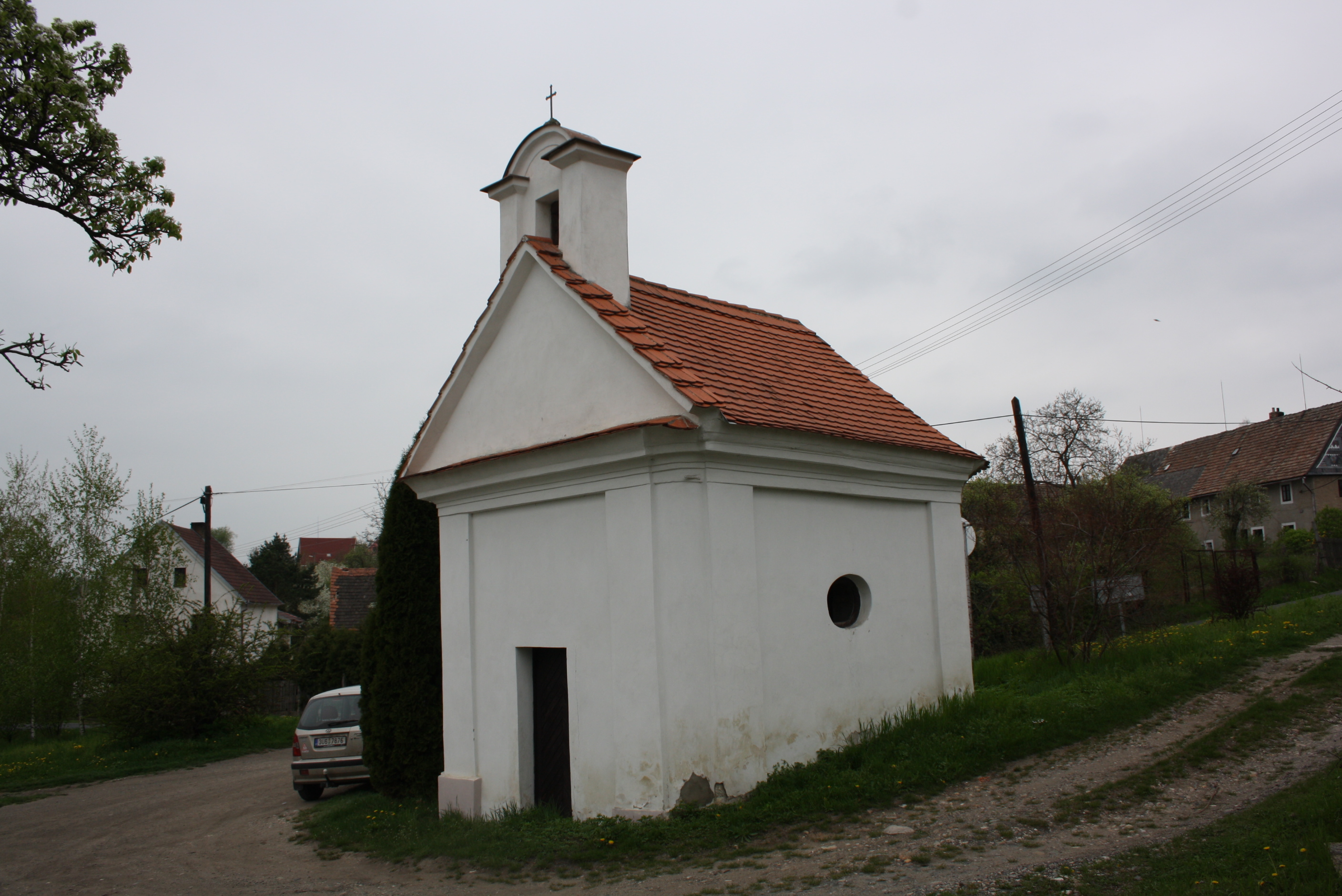 Kaplička v Libínkách (pohled od východu).